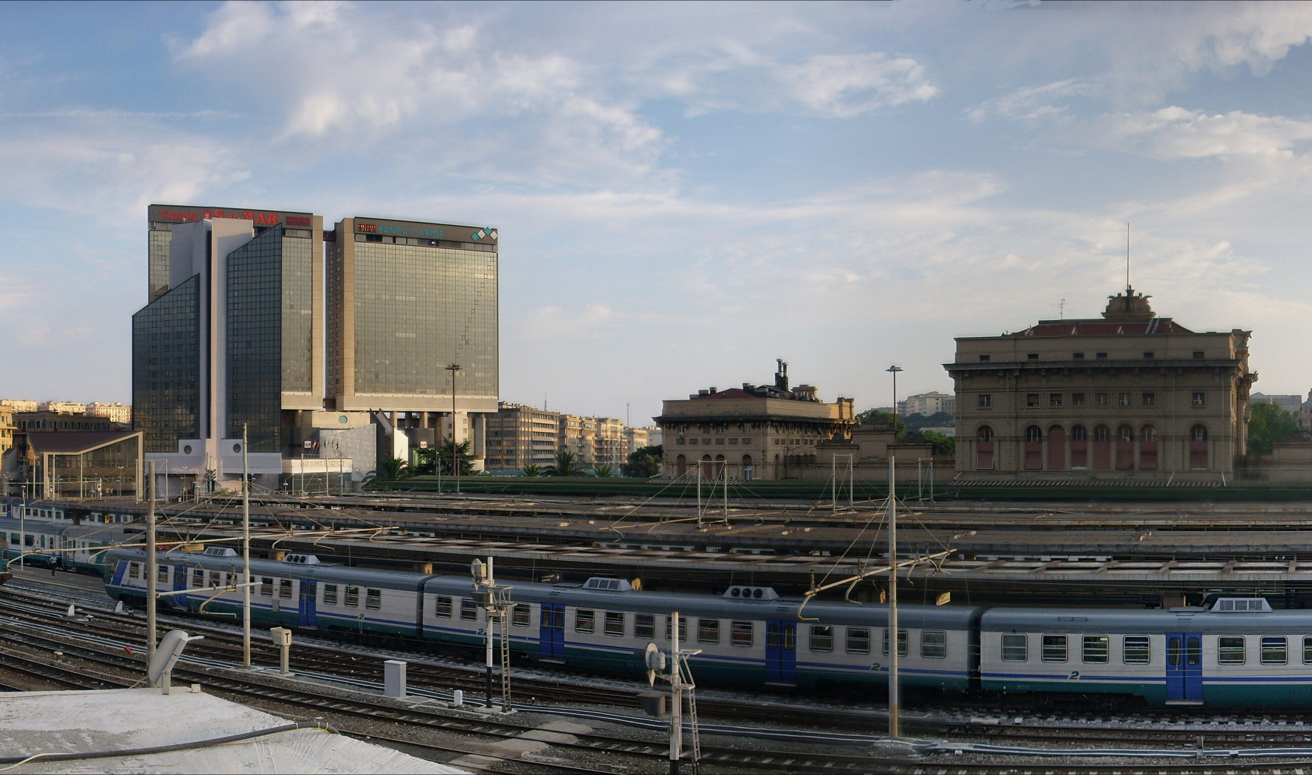 Panorama sulla stazione di Genova Brignole dalla collina di Montesano (derivato dal File:Stazione Brignole panoramica 01.jpg già presente su Commons)